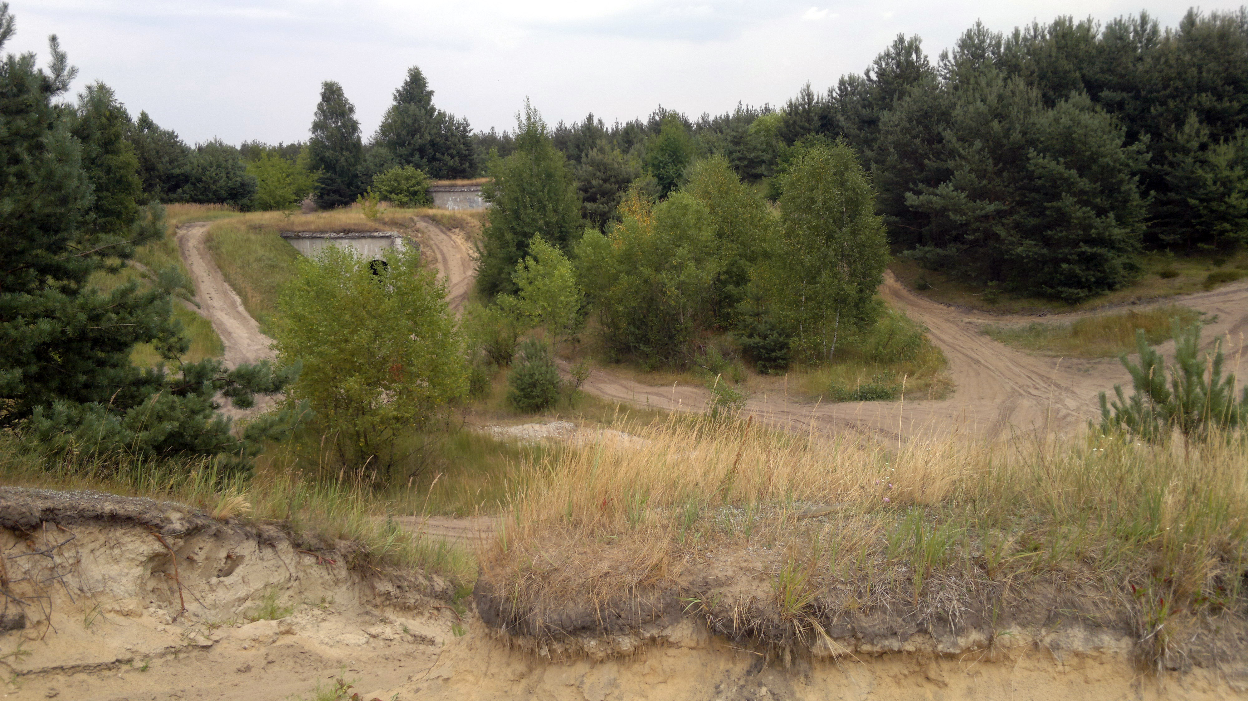 Beniaminów, fort, XIX/XX